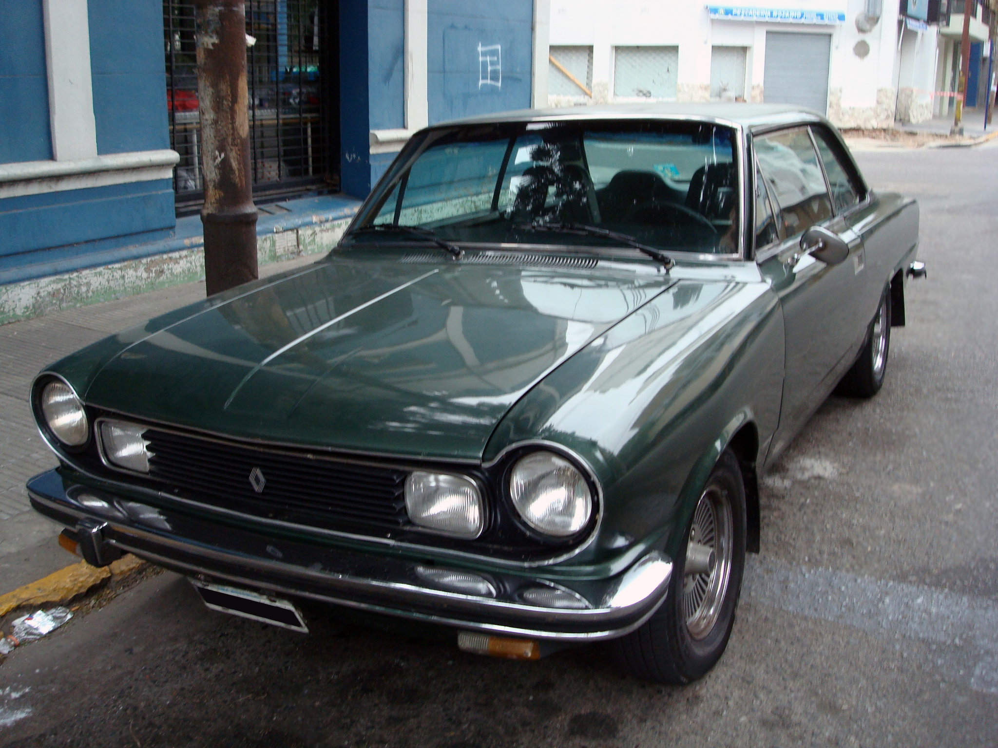 Un modelo Torino ZX (con el logo Renault) en Rosario, Argentina.